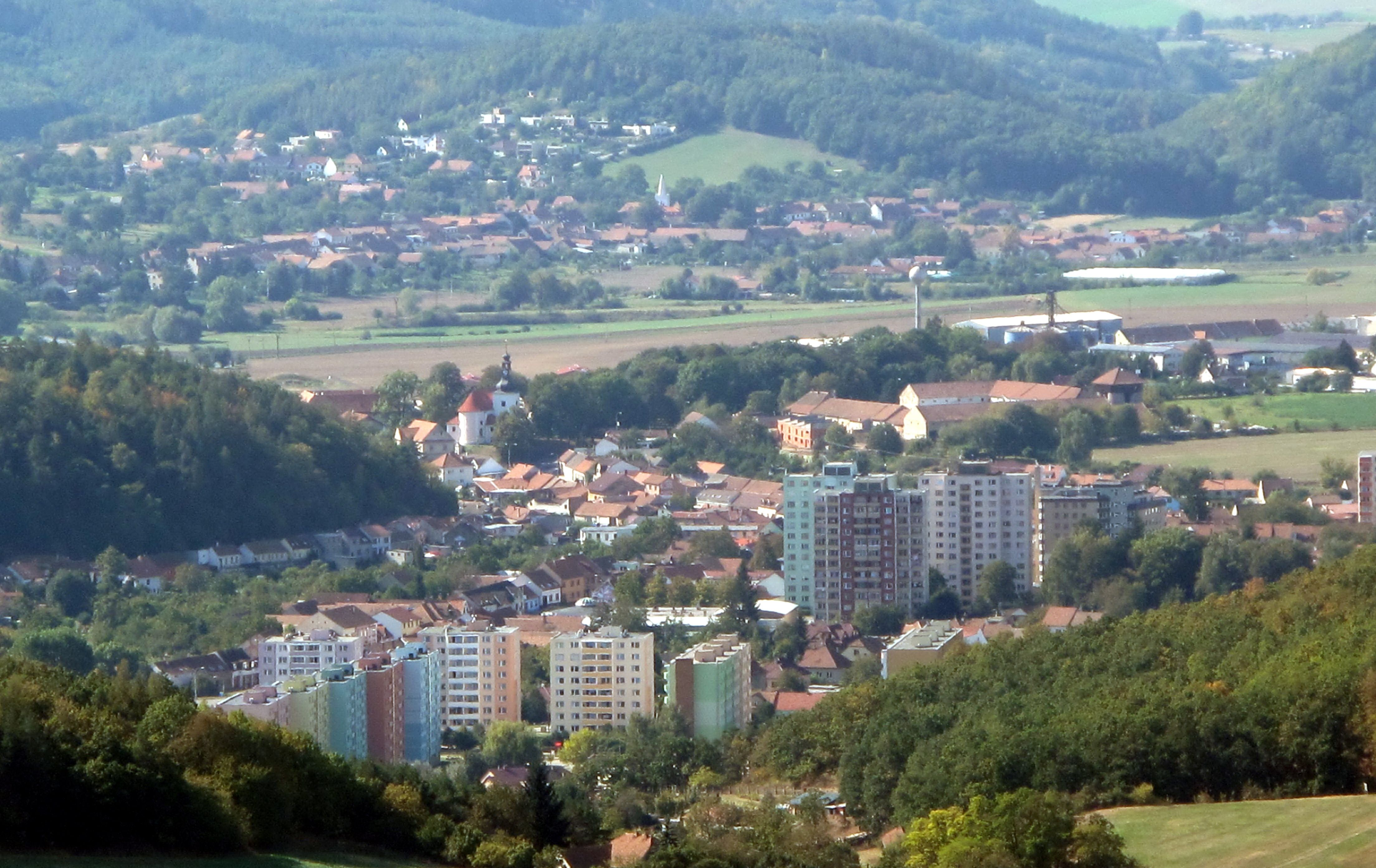 Pohled na Kuřim z rozhledny Babí lom